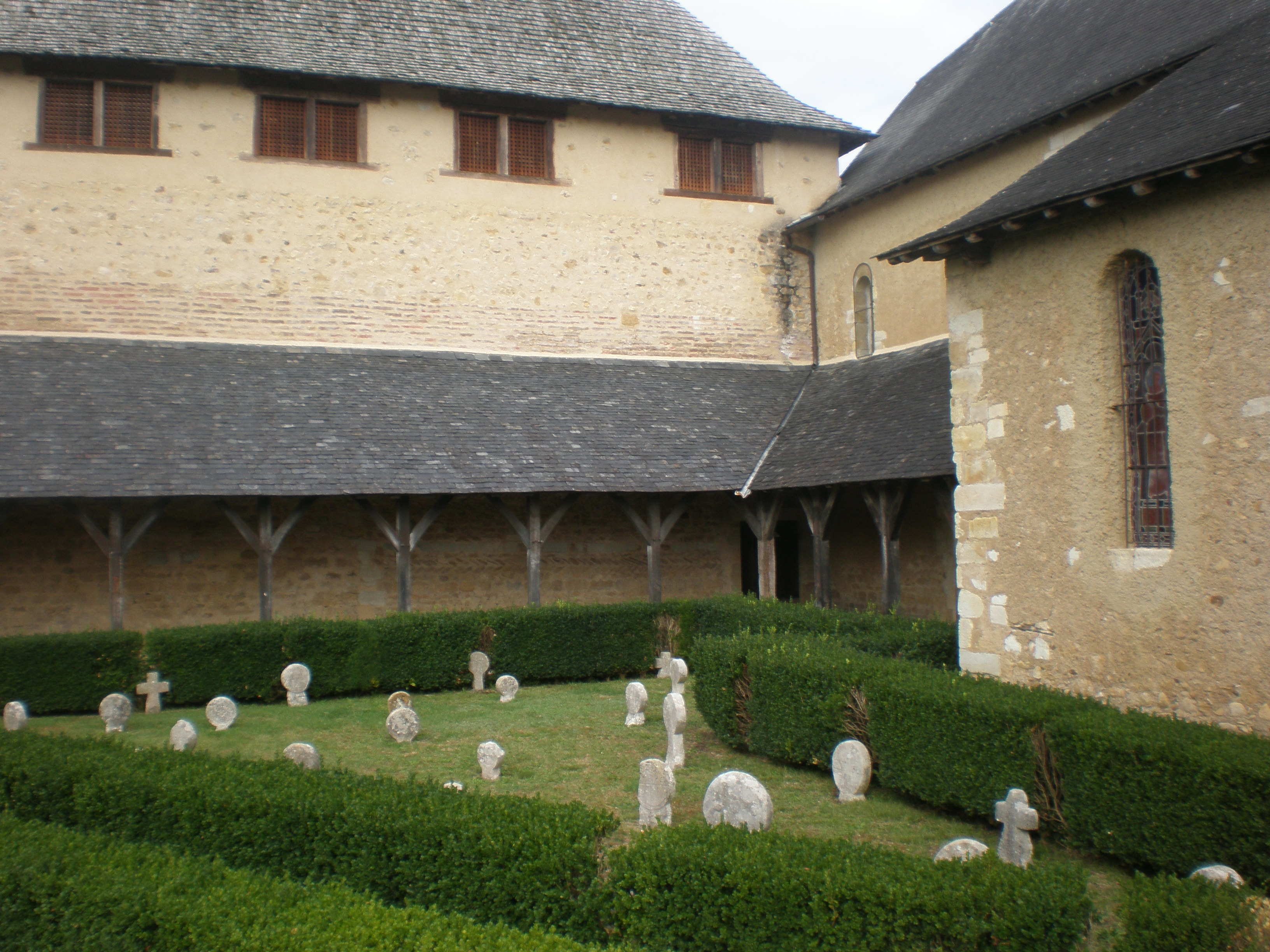 Stèles discoidales de l'ancien cimetière de Lacommande